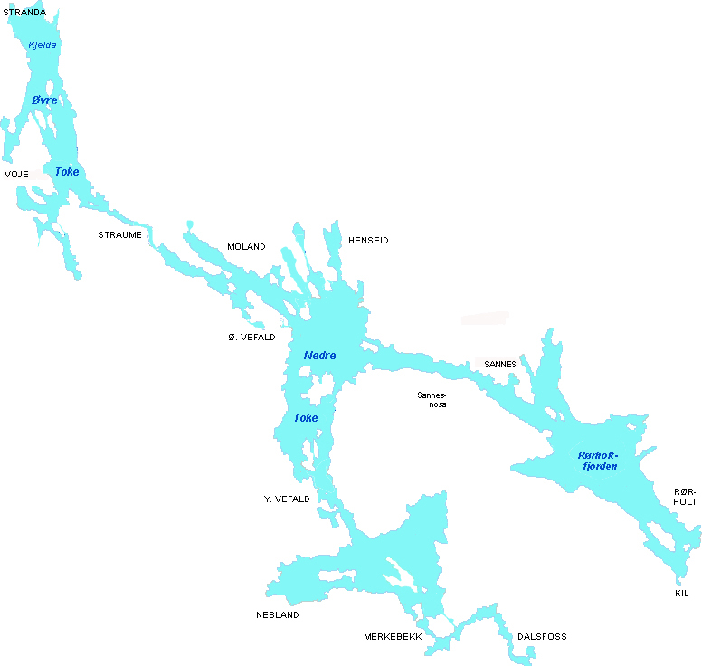 Toke